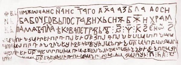 Двуязычная надпись монастыря Витовница